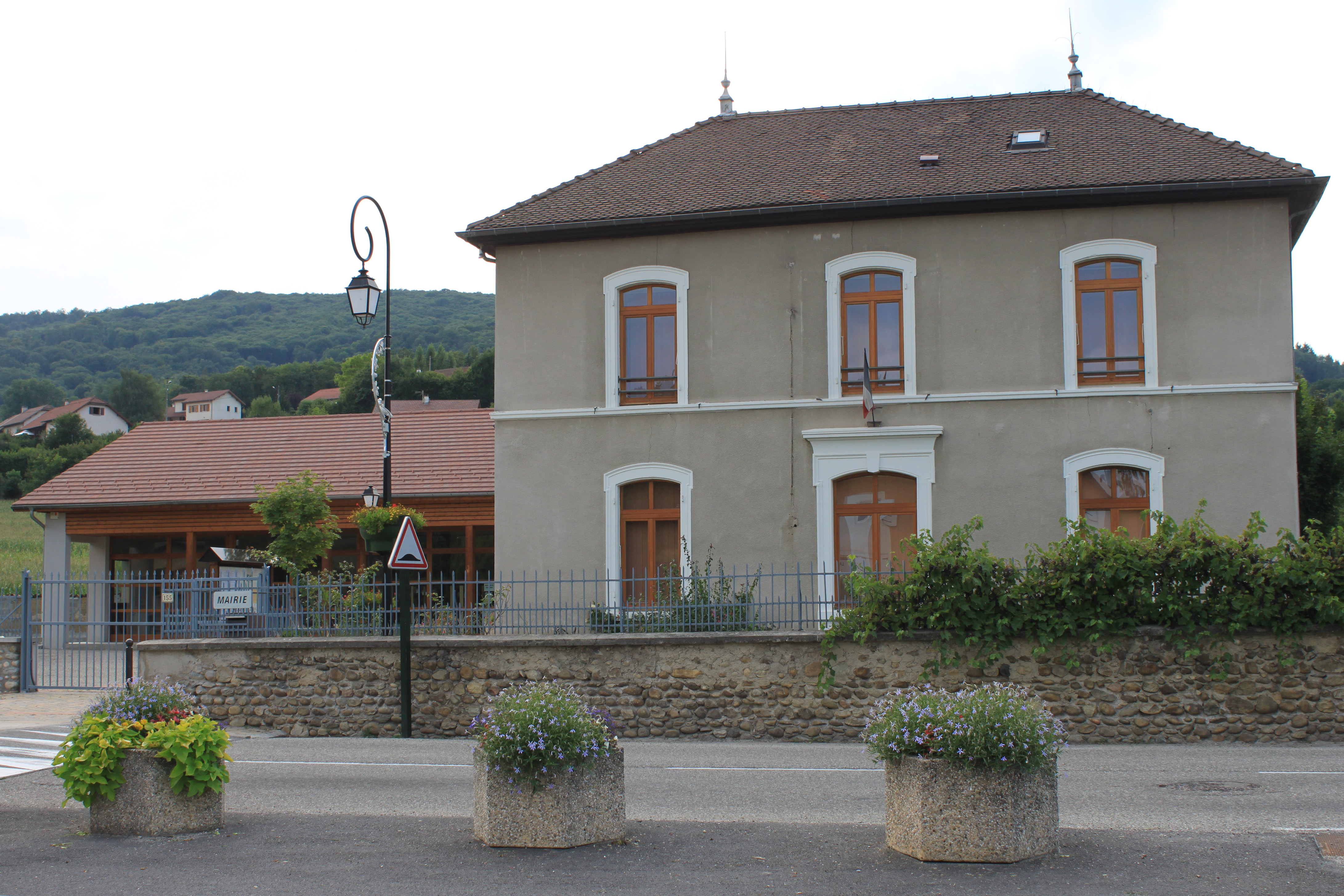 La mairie du Pin en Isère